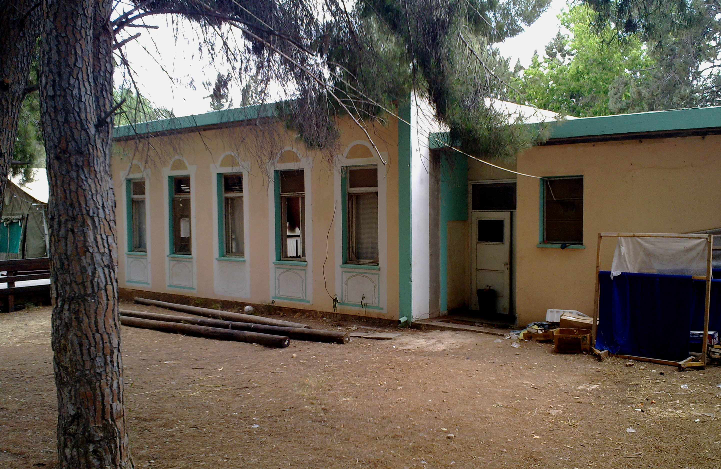 מבוא מודיעין בית הכנסת